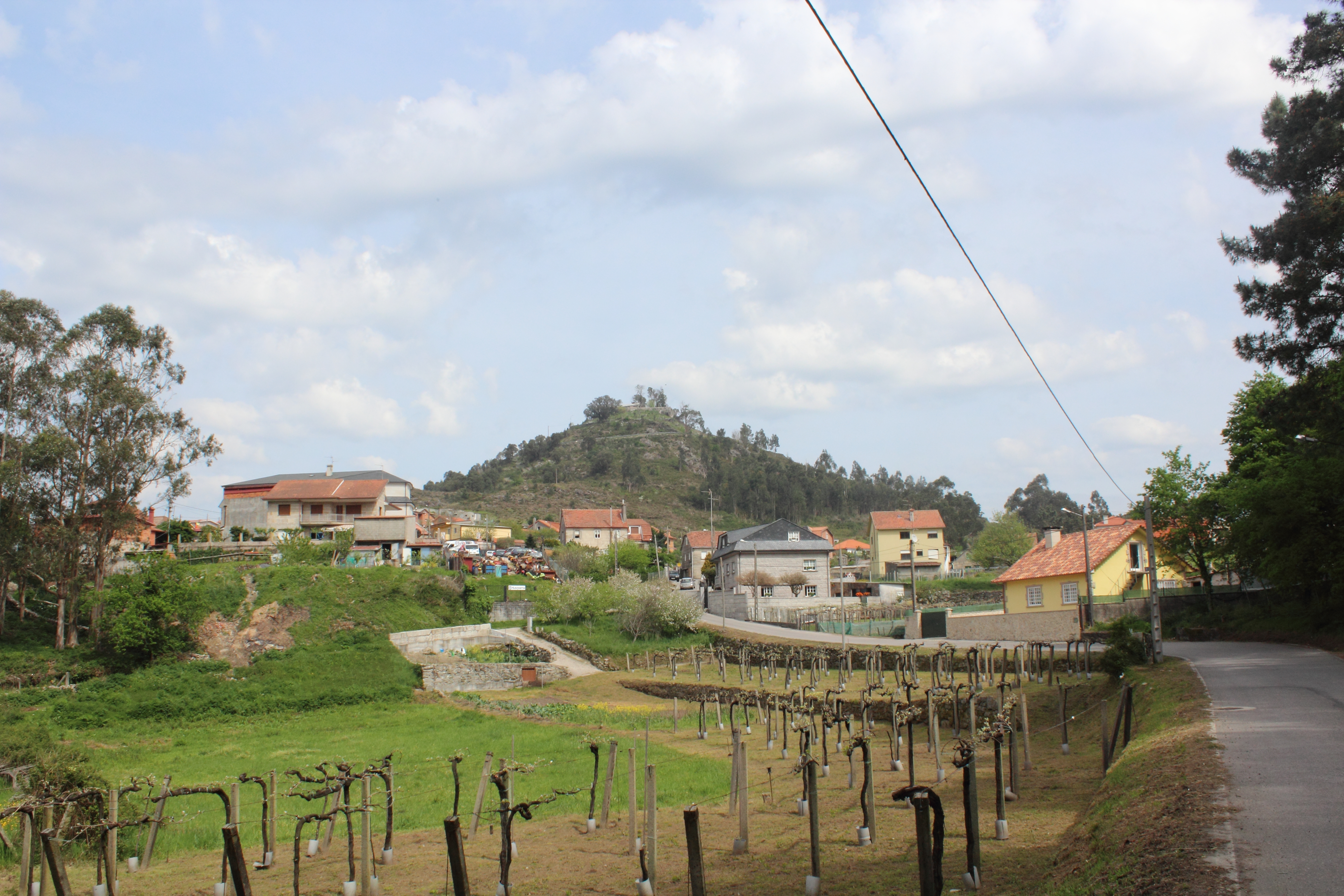 Monte da Peneda, na parroquia redondelá do Viso.